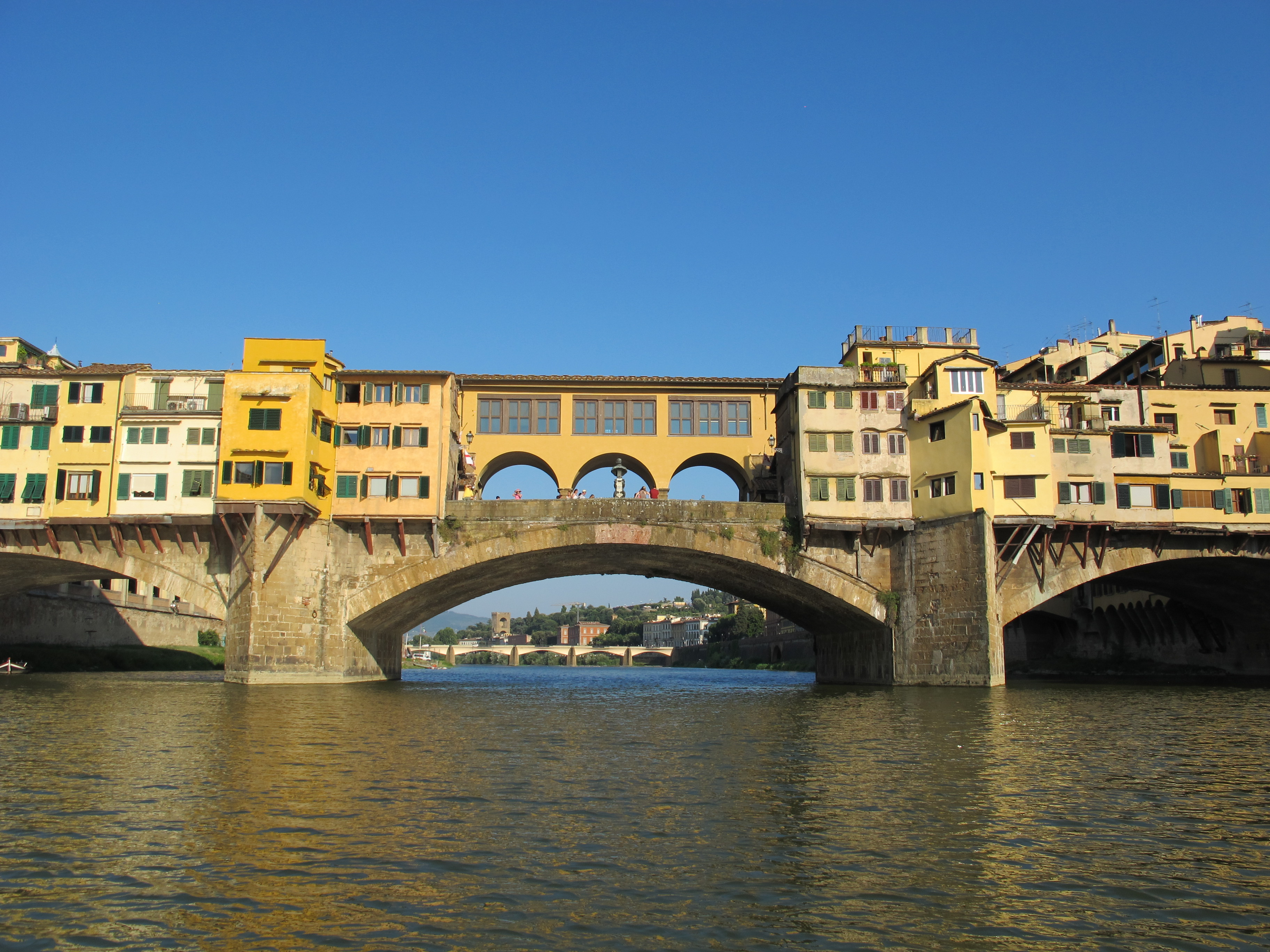 Ponte vecchio (ovest) visto dal fiume